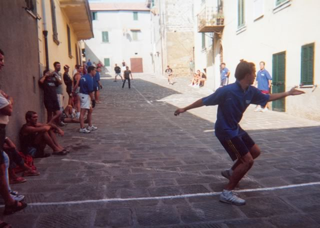 Autore: Utente:Trapanator; Fonte: Utente:Trapanator, foto amatoriale fatta da me nel settembre 2001; Descrizione: Palla Eh! - Il mando